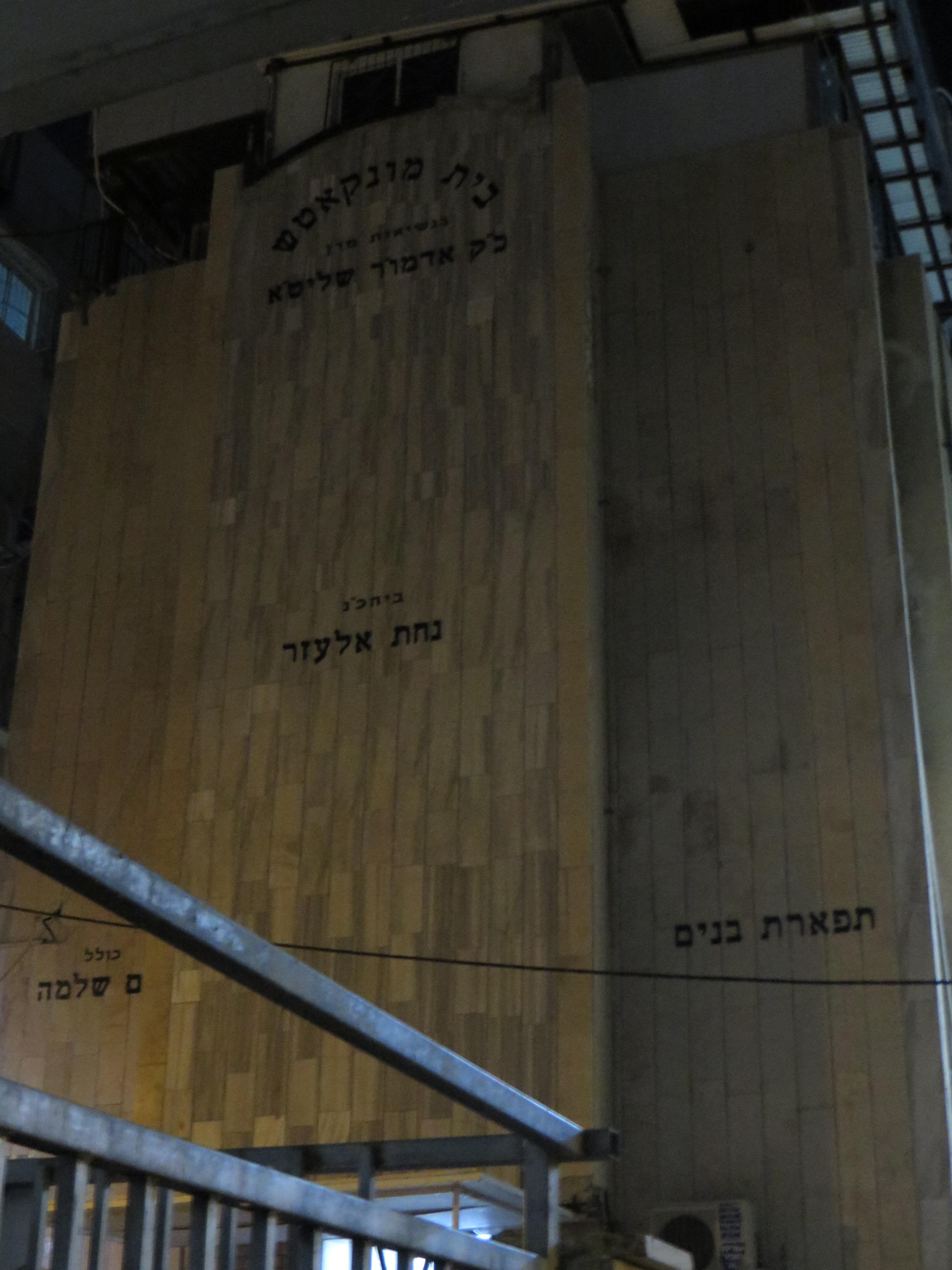 בניין חסידות מונקאטש ברחוב אור החיים בבני ברק